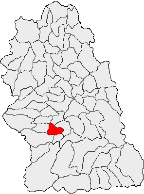 Categorie:Hărţi ale judeţului Hunedoara